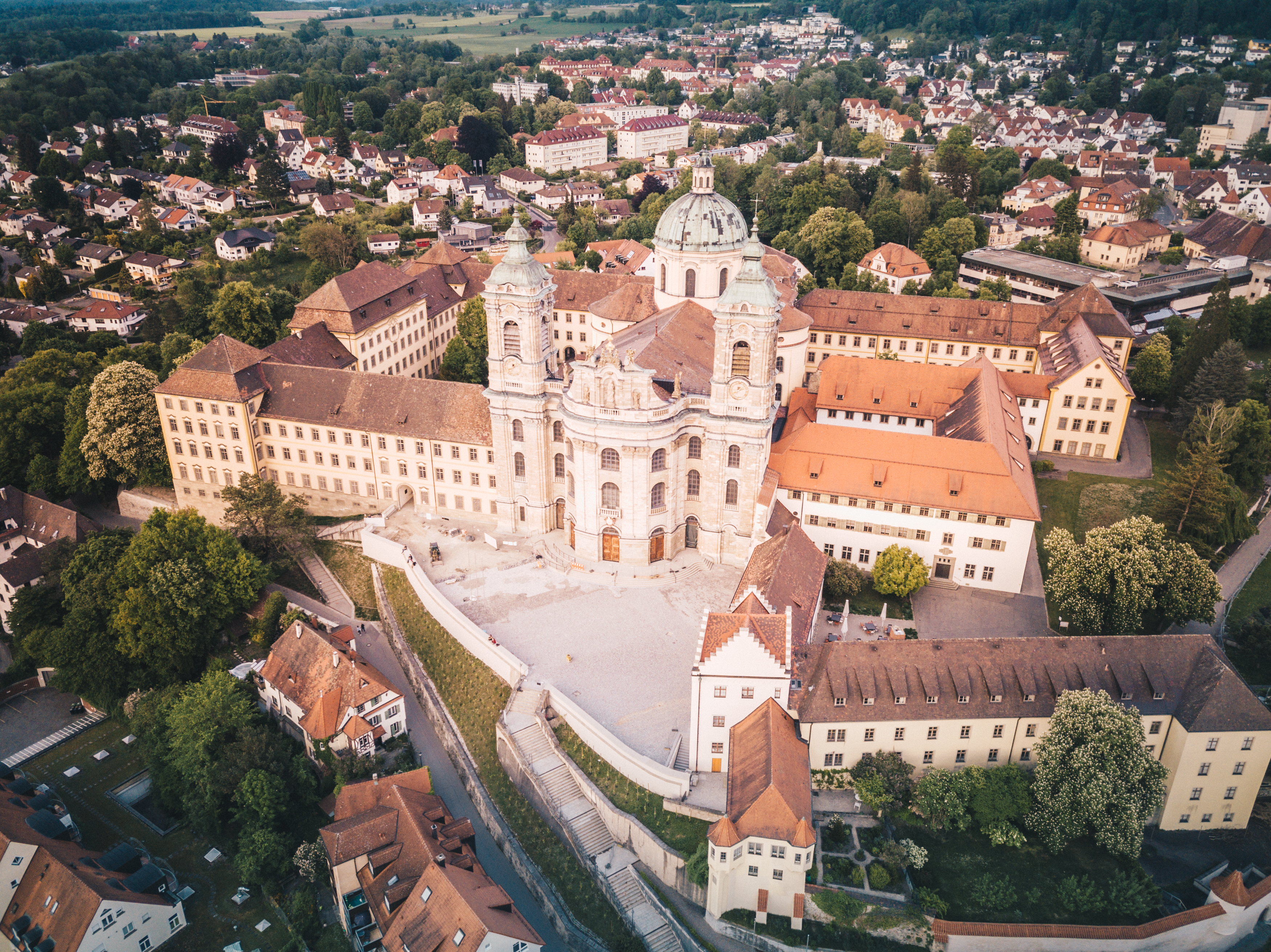 Basilika Weingarten St. Martin Mai 2020